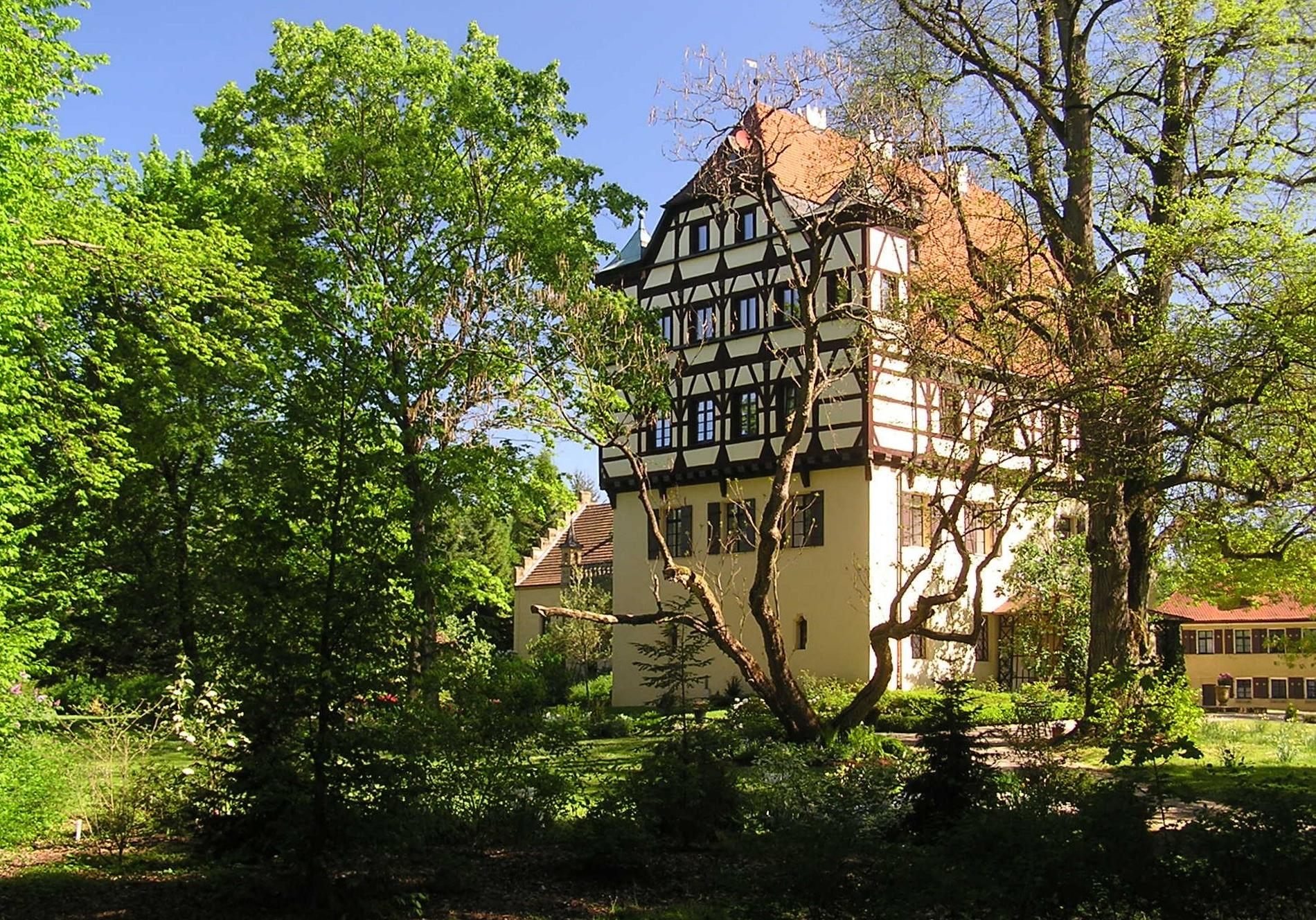 (Altes) Tucherschloss in Simmelsdorf (Mittelfranken)